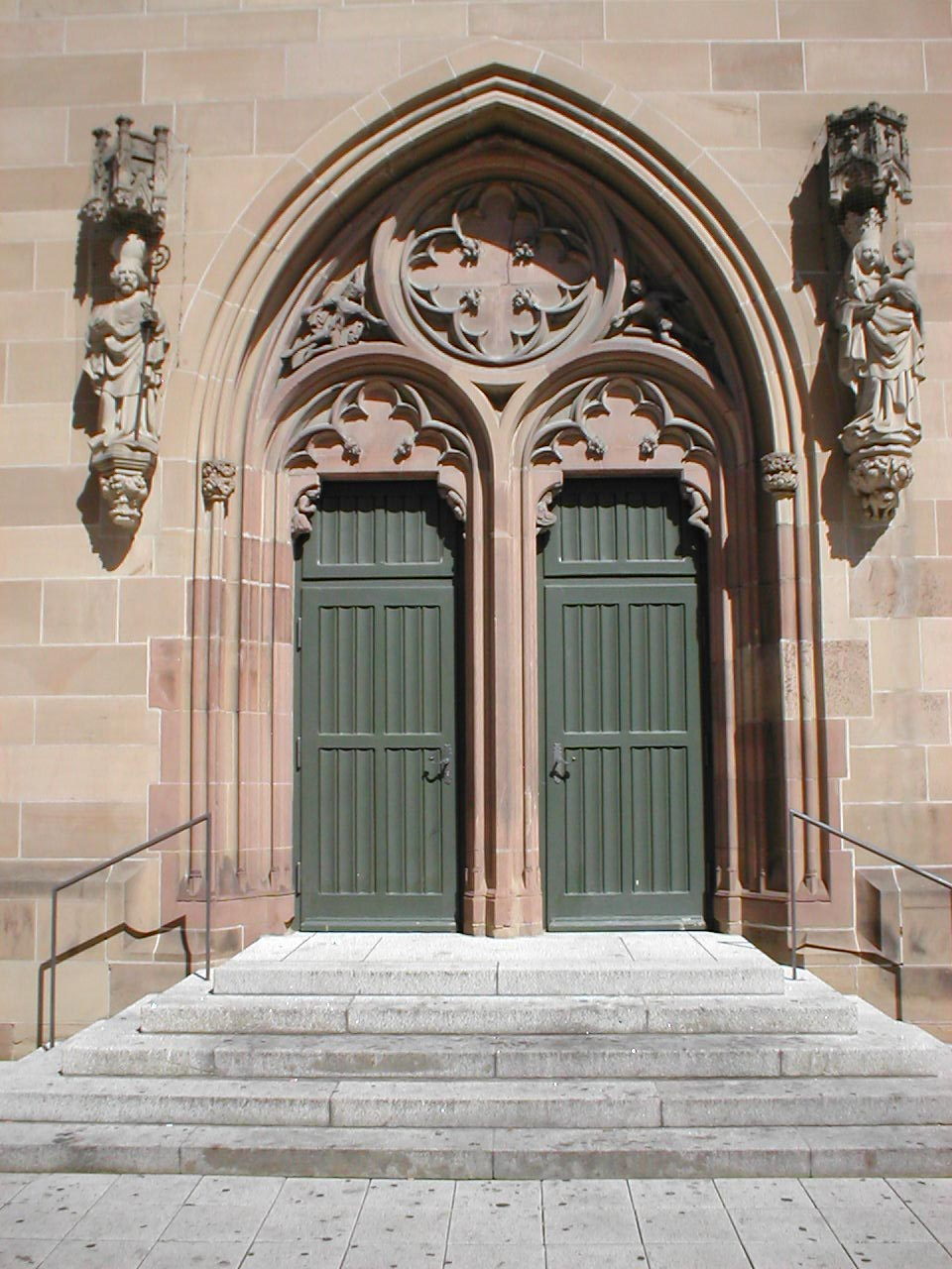 Portal der Nicolaikirche in Heilbronn